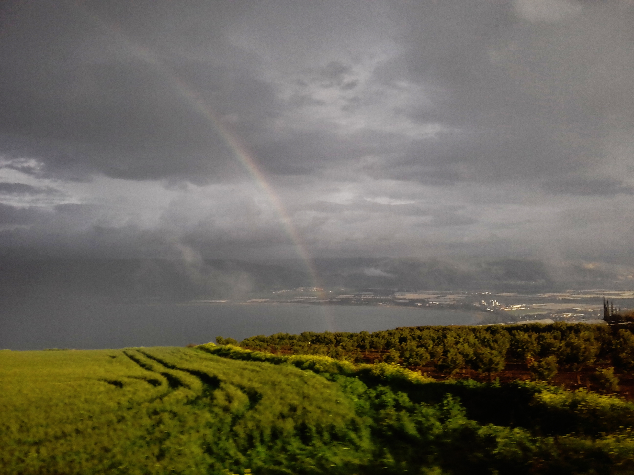 Arbel dağı və Qaliley gölü